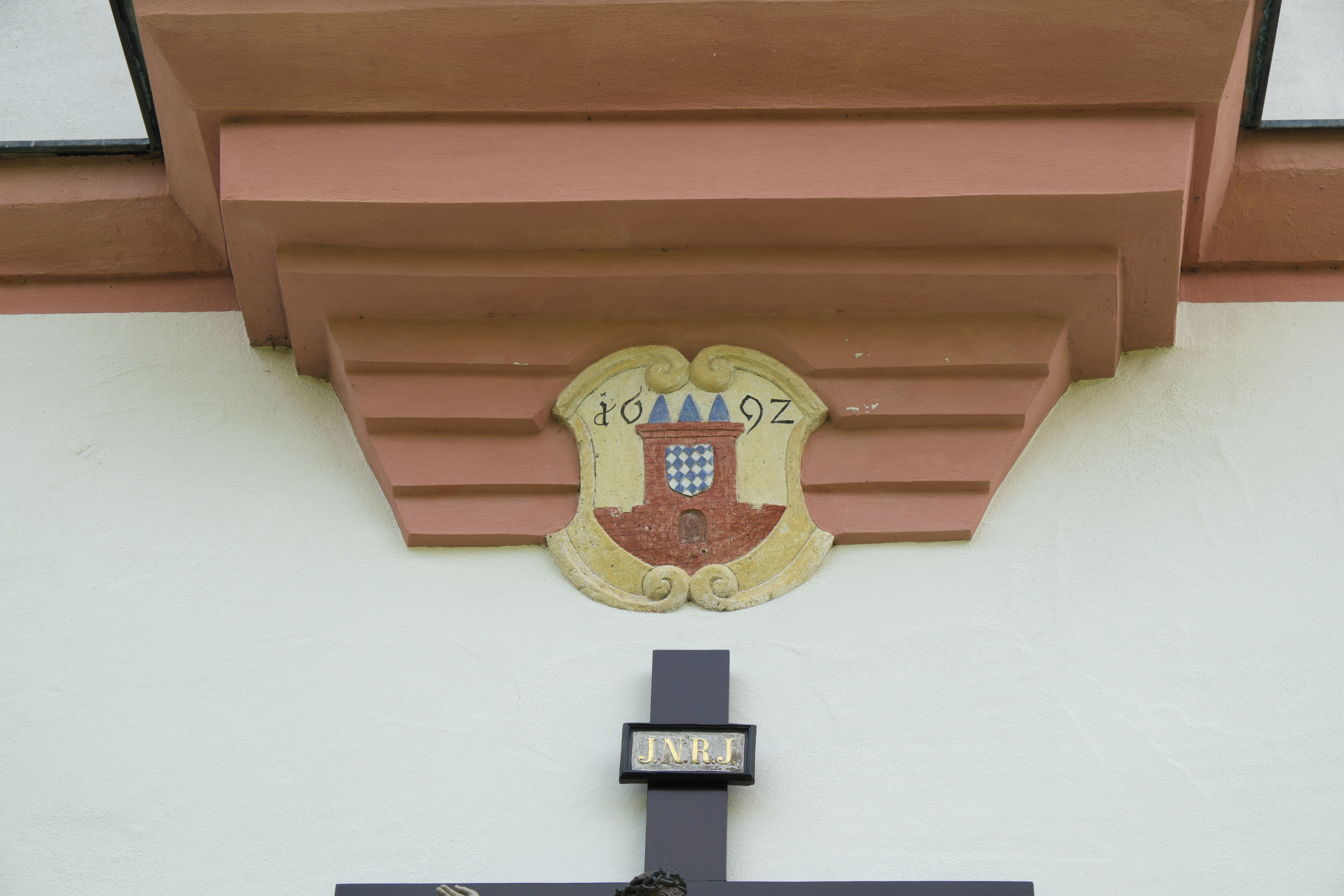 Kapelle St. Georg (Kreuzkapelle), ehemals katholische Pfarrkirche in Bachhagel, einer Gemeinde im Landkreis Dillingen an der Donau (Bayern), Chor aus dem 15. Jahrhundert, Langhaus von 1692, Westfassade mit dem steinernen Stadtwappen von Höchstädt und der Jahreszahl 1692 unter dem Dachreiter